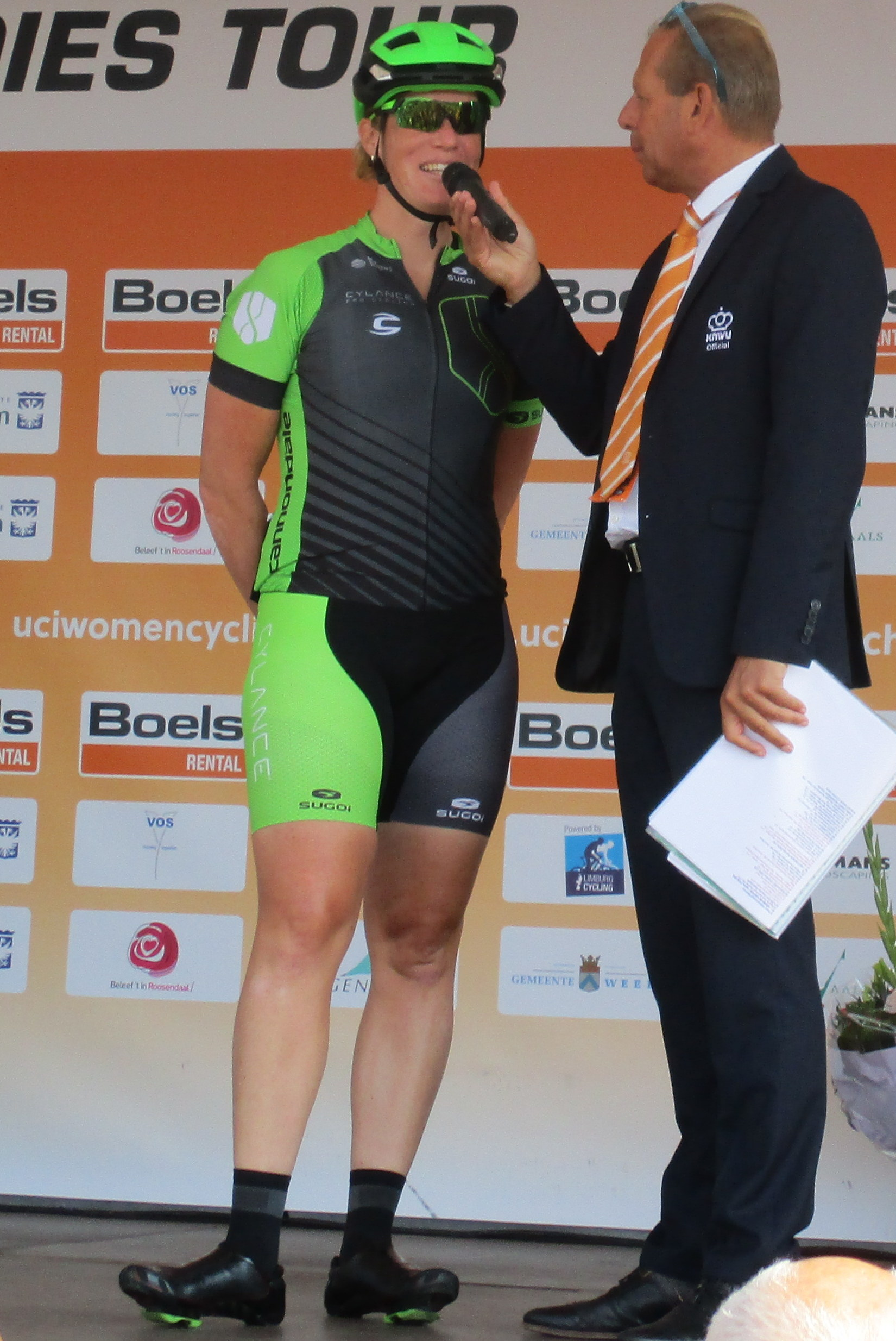 Start van de 6e etappe van de Boels Ladies Tour 2017 op het Tom Dumoulin Bike Park in Sittard-Geleen.